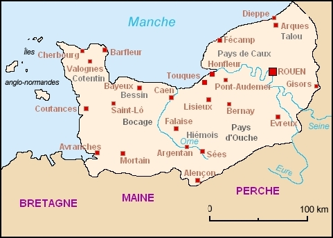 Le duché de Normandie au XIIe siècle